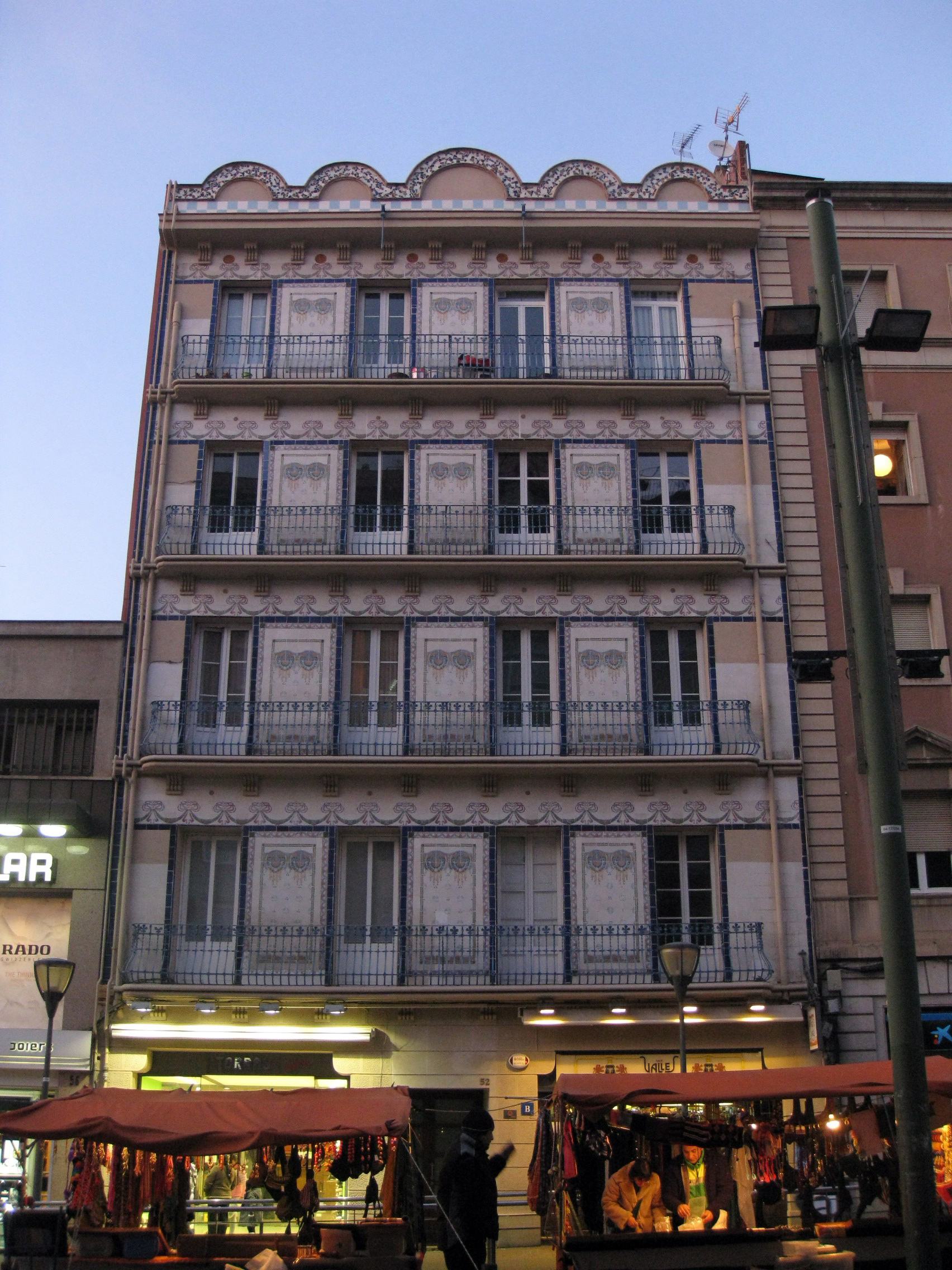 L'anomenada Casa del Bunyolero, al Portal de Sant Roc núm. 54 (Terrassa). Fotografia feta al capvespre.